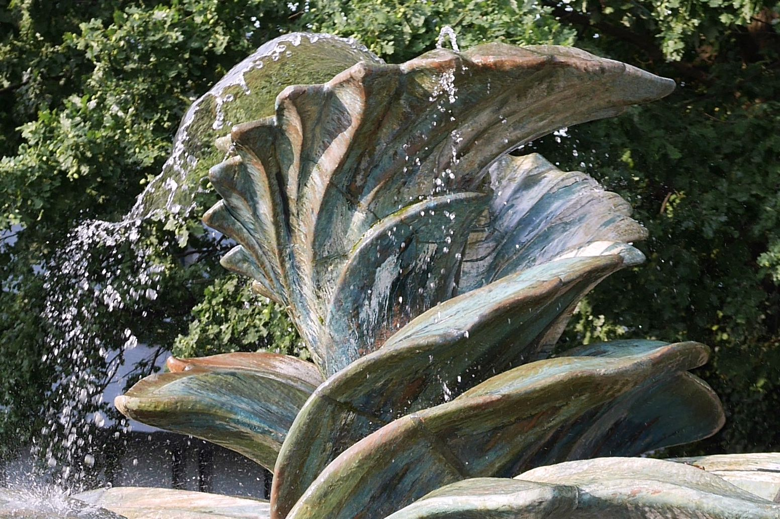 ♁52° 22′ 37″ N, 9° 45′ 15″ O Majolikabrunnen oder Resebrunnen in Hannover zwischen Fritz-Behrens-Allee und Hindenburgstraße